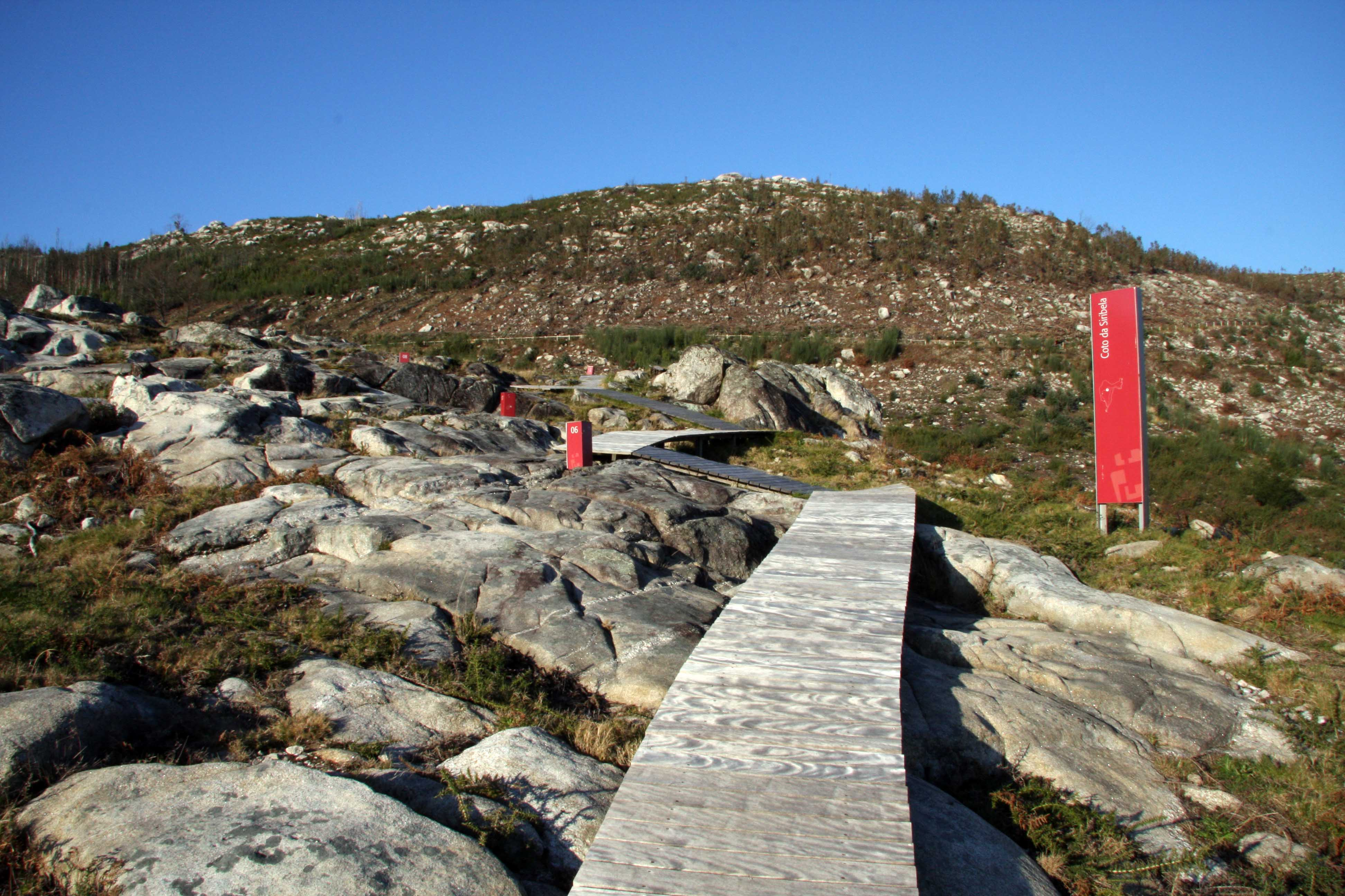 Coto da siribela. Área Arqueológica de Tourón en Ponte Caldelas tiene una extensión de algo más de 150.000 metros cuadrados (ver plano). En su interior, se encuentra uno de los conjuntos de arte rupestre al aire libre más importantes de Galicia. Cinco estaciones visitables de diferente tamaño, ofrecen la posibilidad de contemplar una amplia variedad de petroglifos o gravados sobre la piedra (realizados entre el III/ II milenio a.c). Los petroglifos que se encuentran en el interior del Área son de diferentes motivos, y van desde los paneles más sencillos con cazoletas, combinaciones circulares o ciervos, hasta los espléndidamente complejos